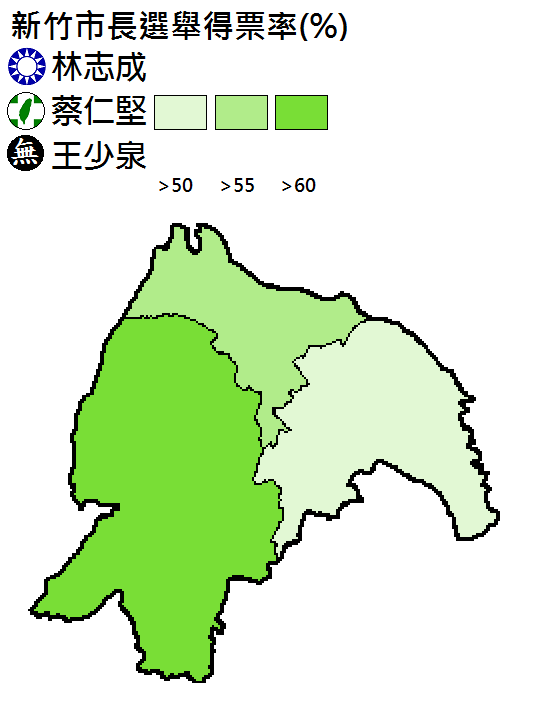 1997年新竹市長選舉